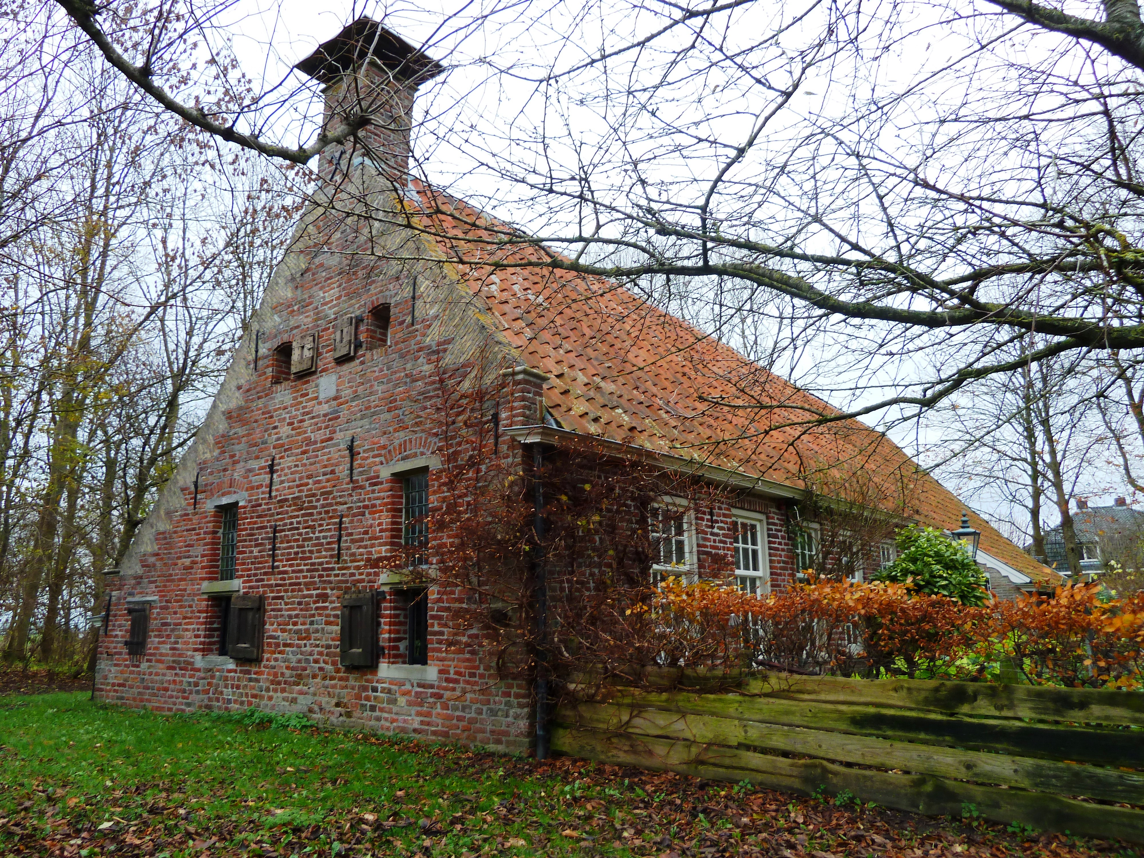 Boerderij Hooge Meeden aan de Weersterweg 20 in het gehucht Hoogemeeden, waarvan het voorhuis een gevelsteen met 'Anno 1618' draagt.